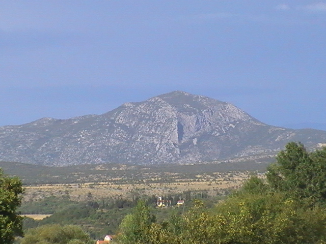 Planina Veliki Kozjak slikana iz Petrovog polja.